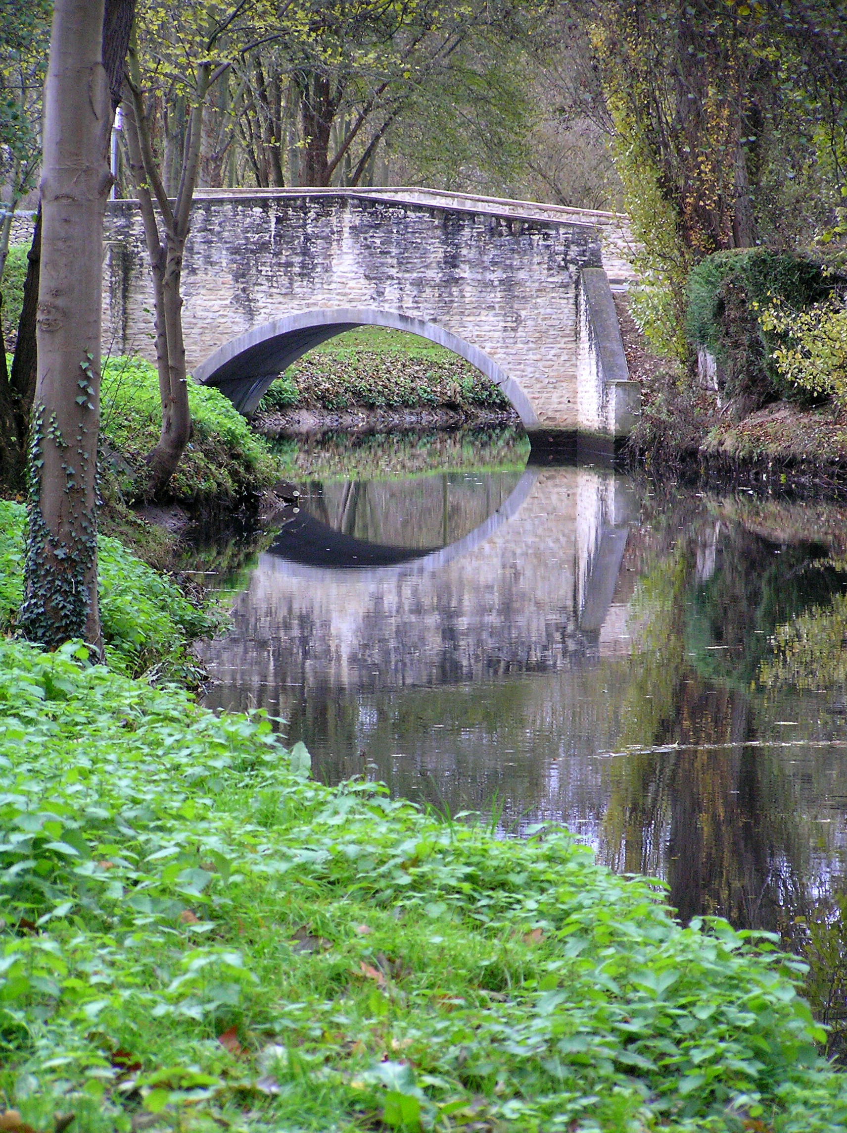 Vaucouleurs (rivière), Mantes-la-Ville, Yvelines, France.jpg [1]